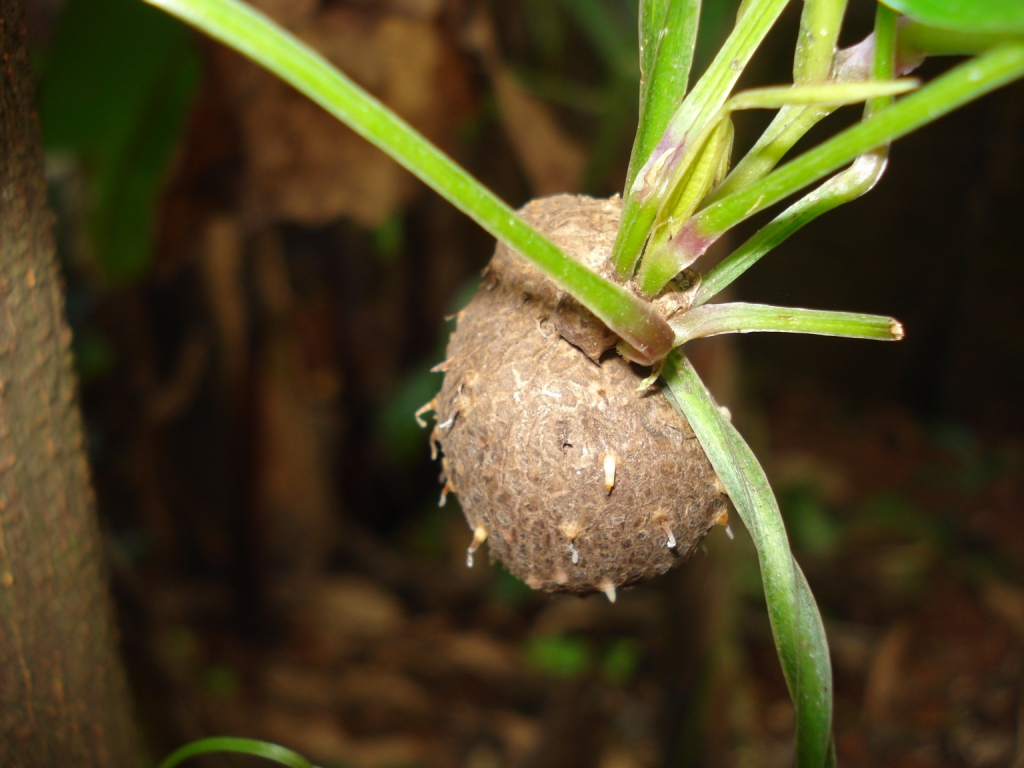 കാച്ചിൽ-കിഴങ്ങ്